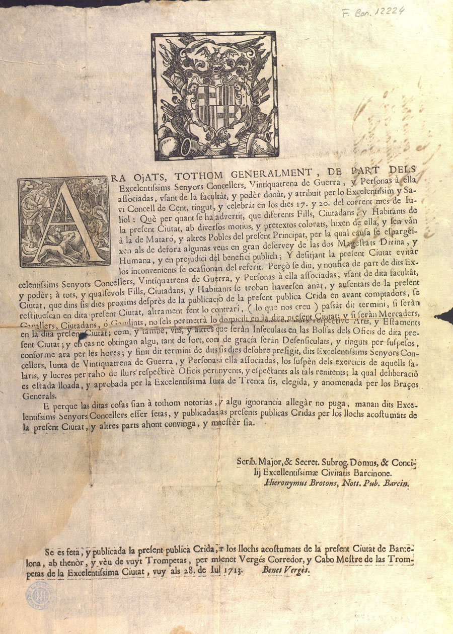 Desinsaculaciones de los contrarios a la continuación de la guerra